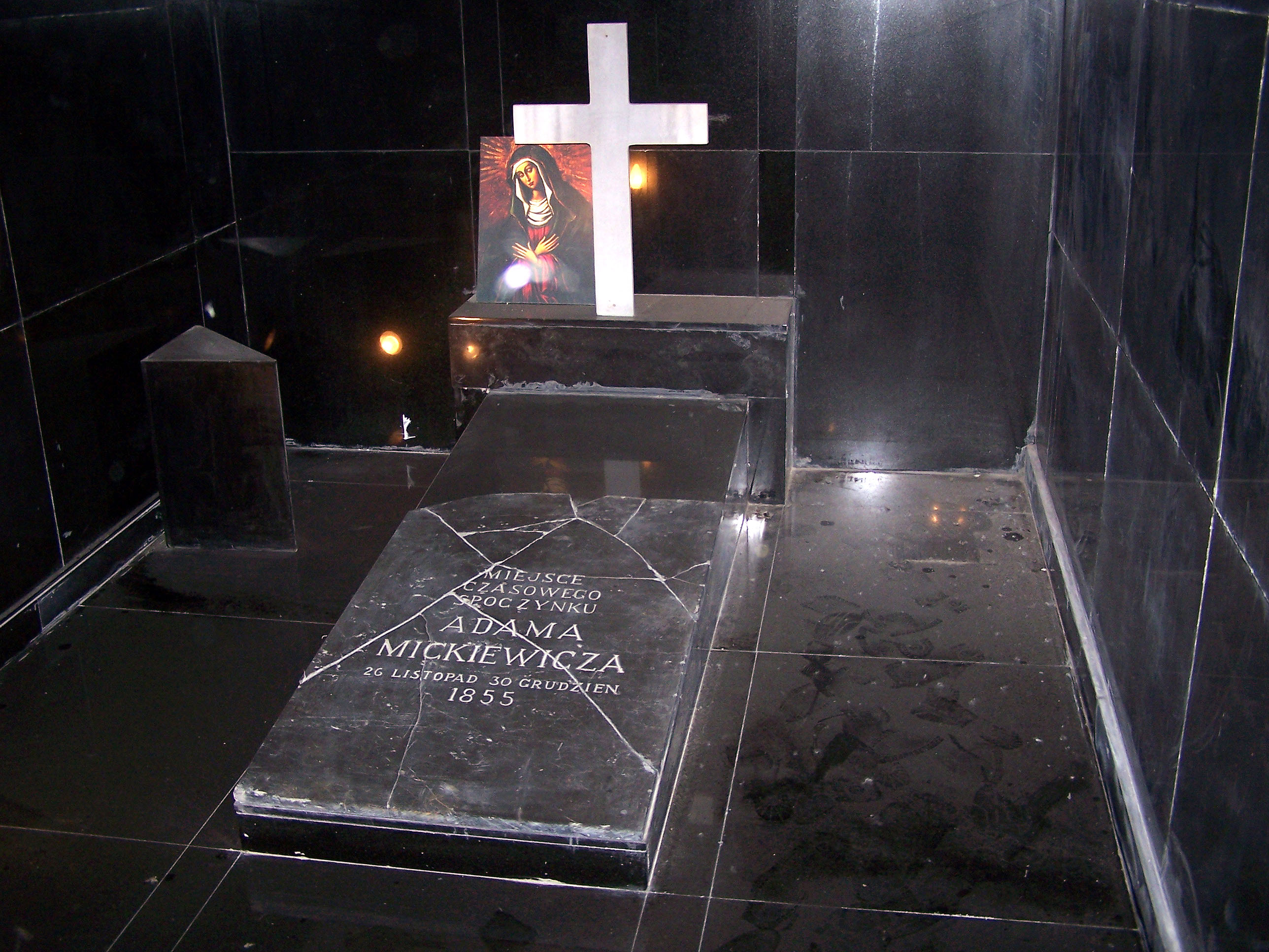 Temporary grave of Adam Mickiewicz in Adam Mickiewicz Müzesi in Beyoğlu, İstanbul, Turkey